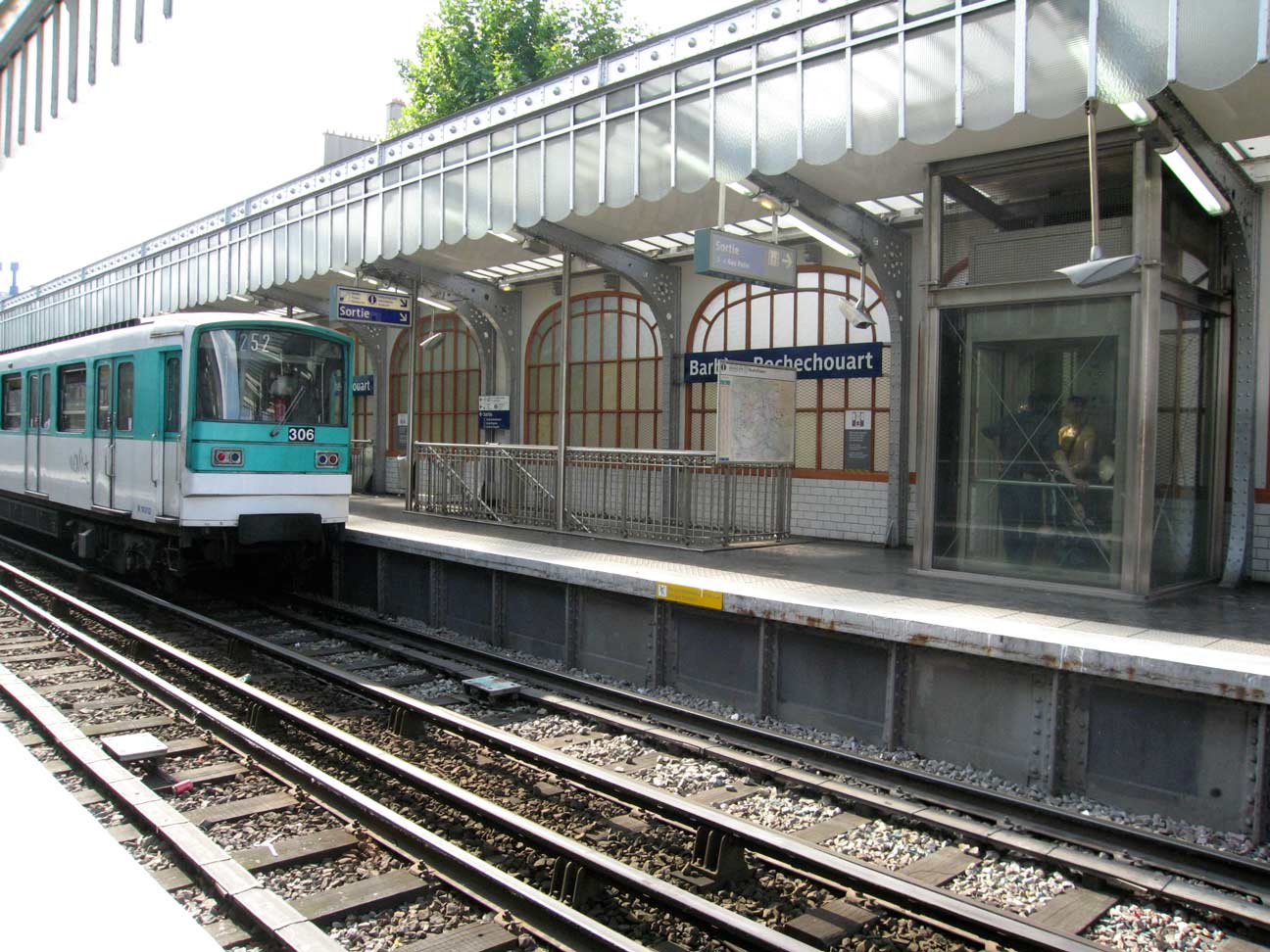 Metro de Paris Ligne 2 Station Barbes Rochechouart Lieu : Paris, France Date : Juin 2006 Auteur : Pline photo personnelle